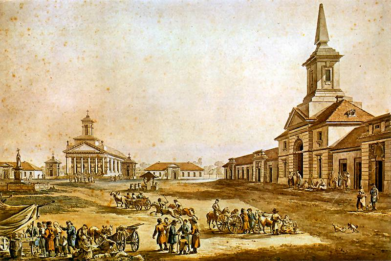 KOCK Kościół parafialny (z lewej) i ratusz. 1796. Akwarela. 36 x 53 cm. Muzeum Narodowe, Warszawa.